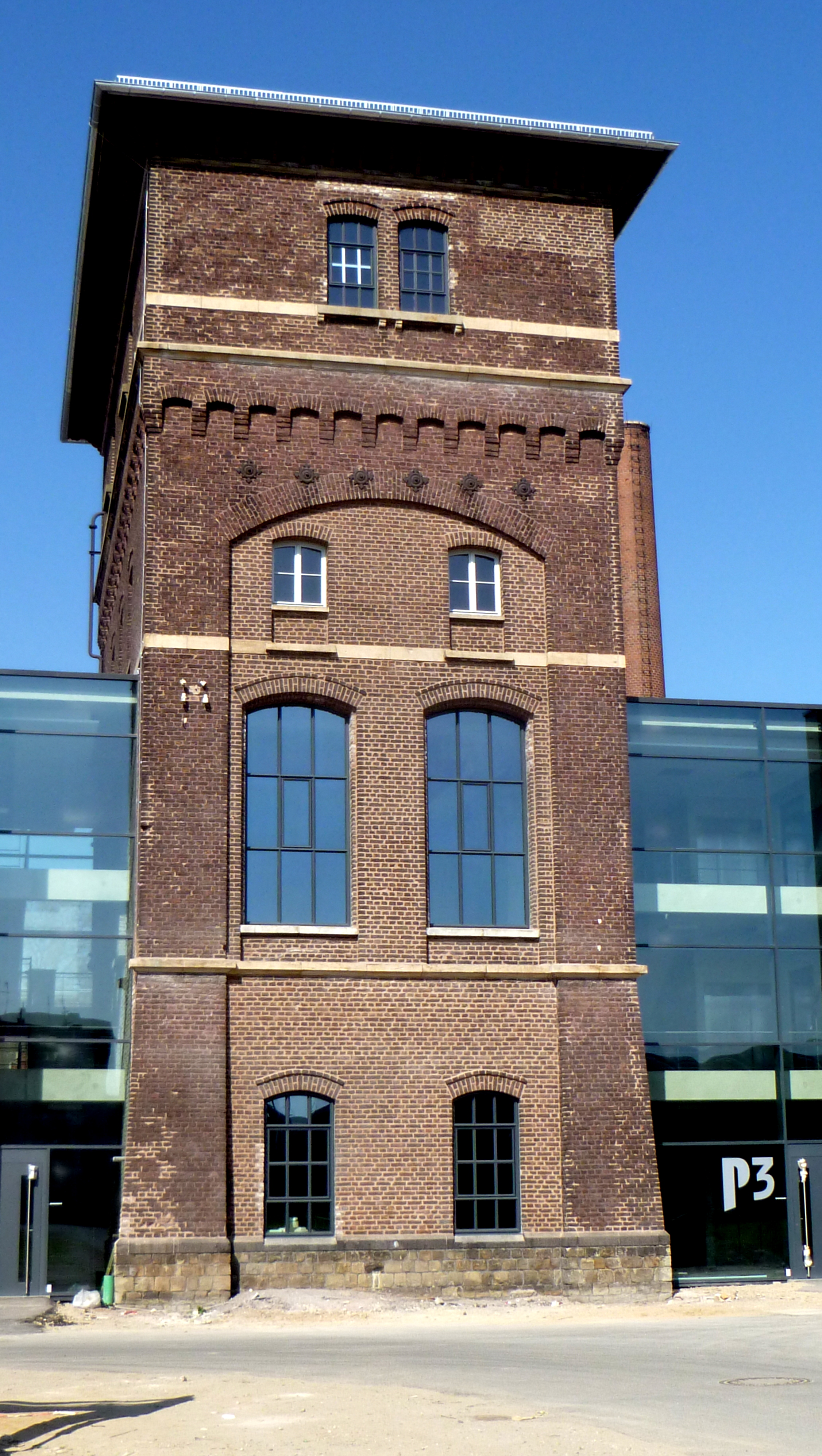 Baudenkmal in Aachen-Mitte